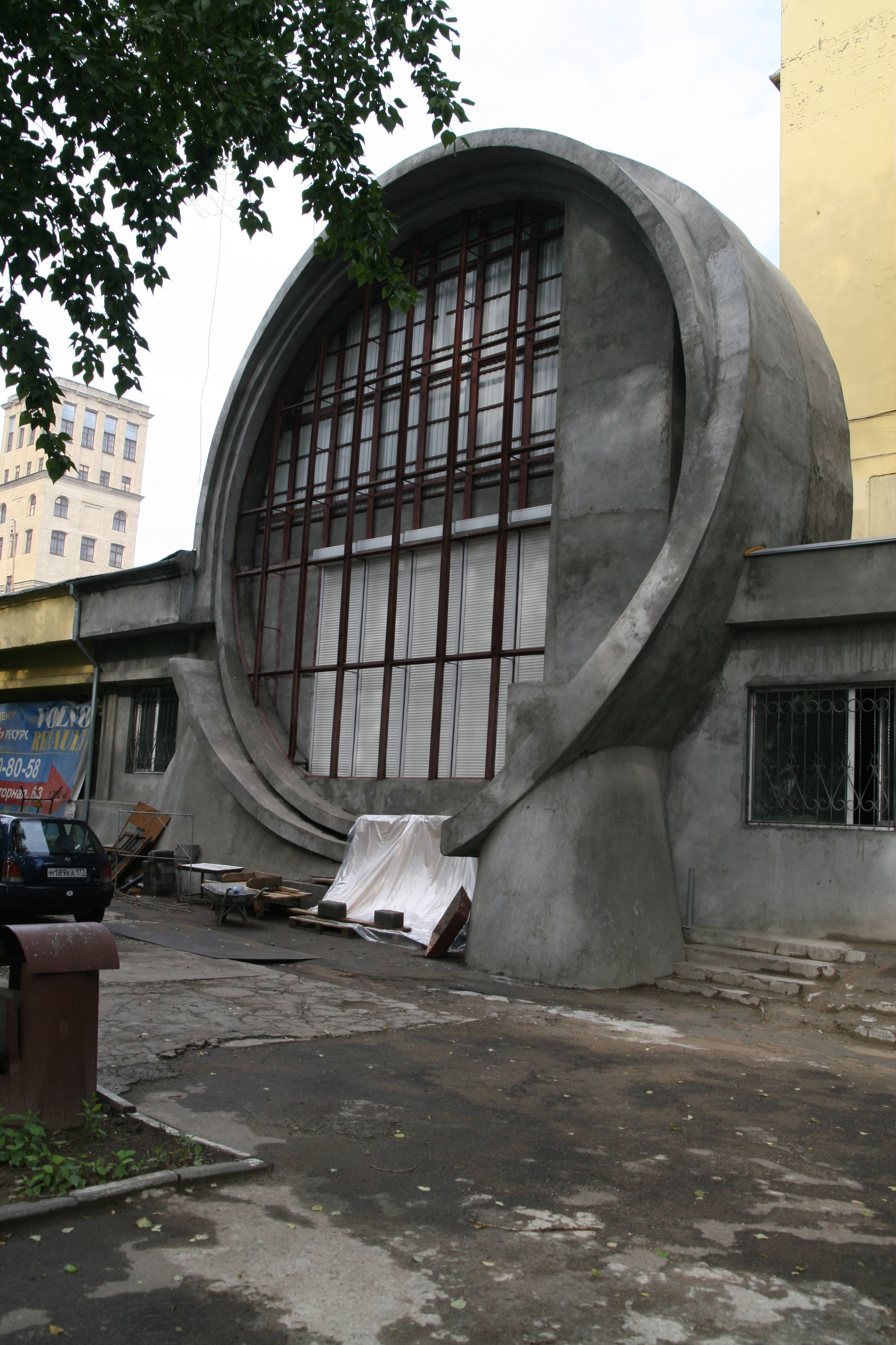 Гараж Госплана (Архитектор К. С. Мельников)